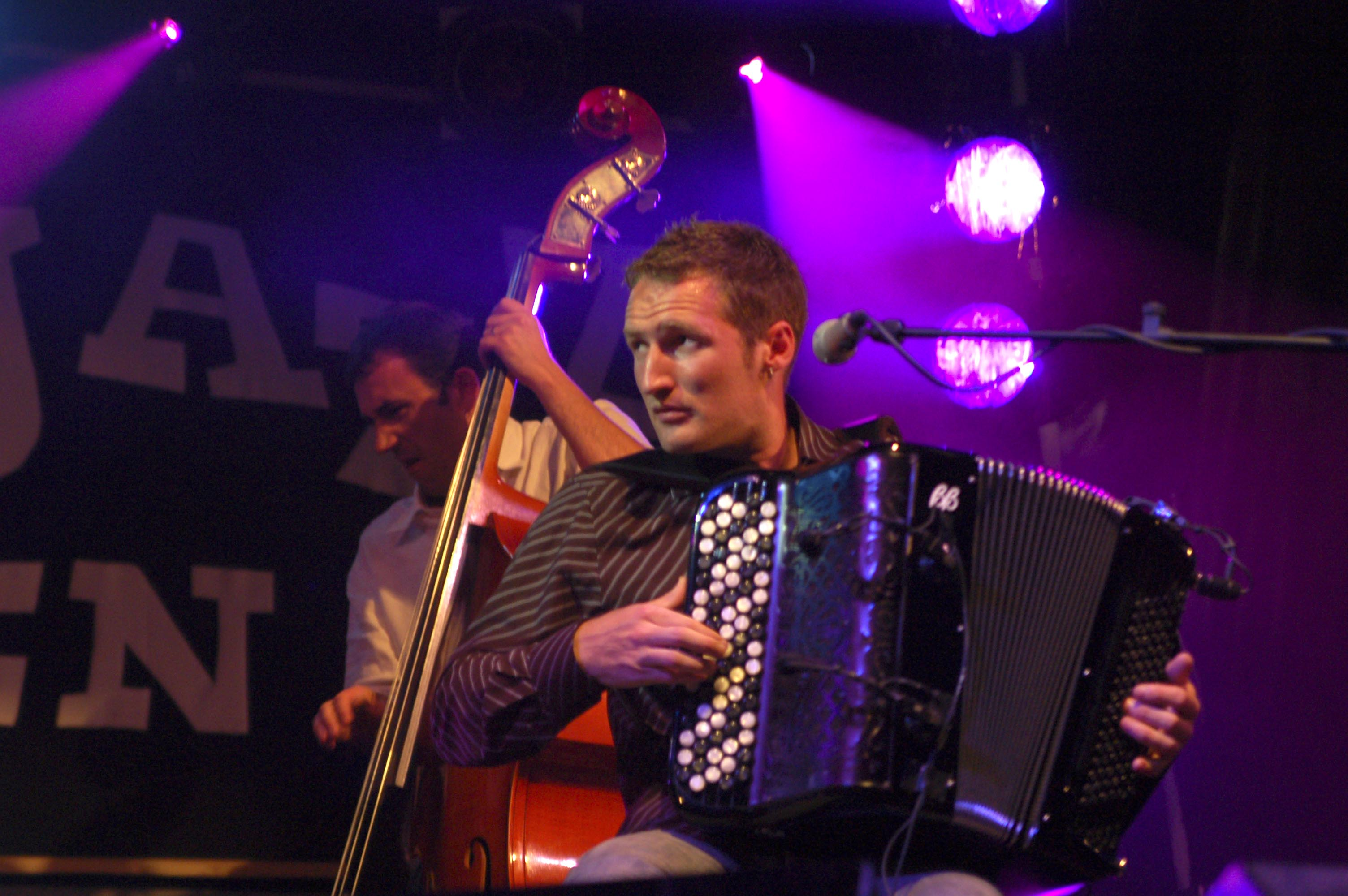 Régis Huiban au Festival Jazz en Ré, août 2006.